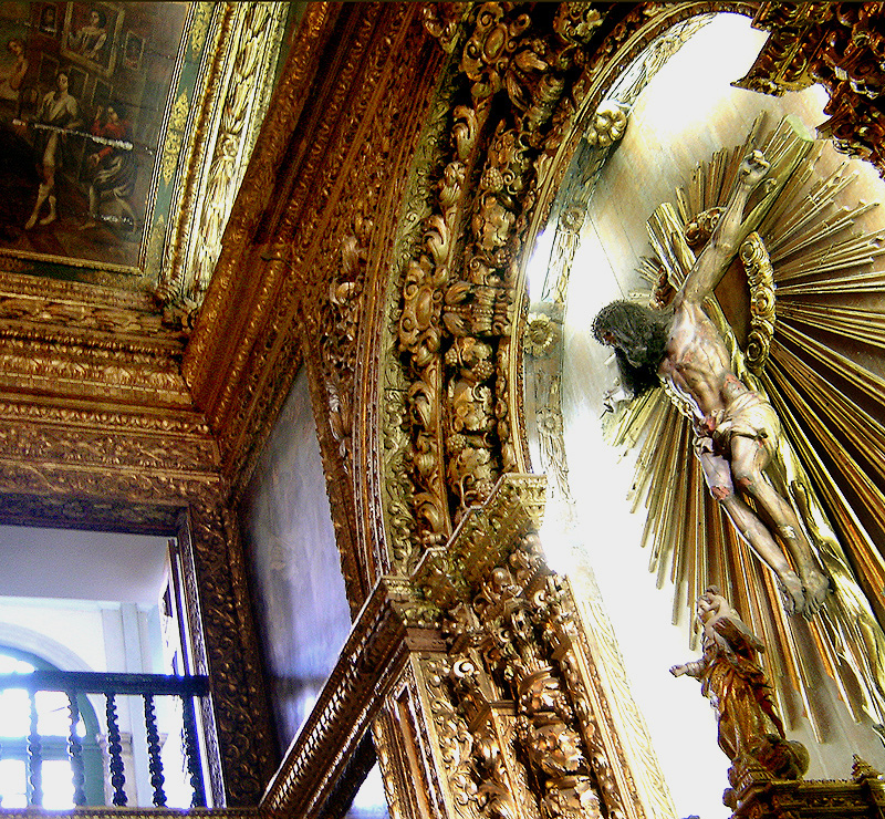 Detalhe do interior da Capela Dourada, em Recife, Brasil.